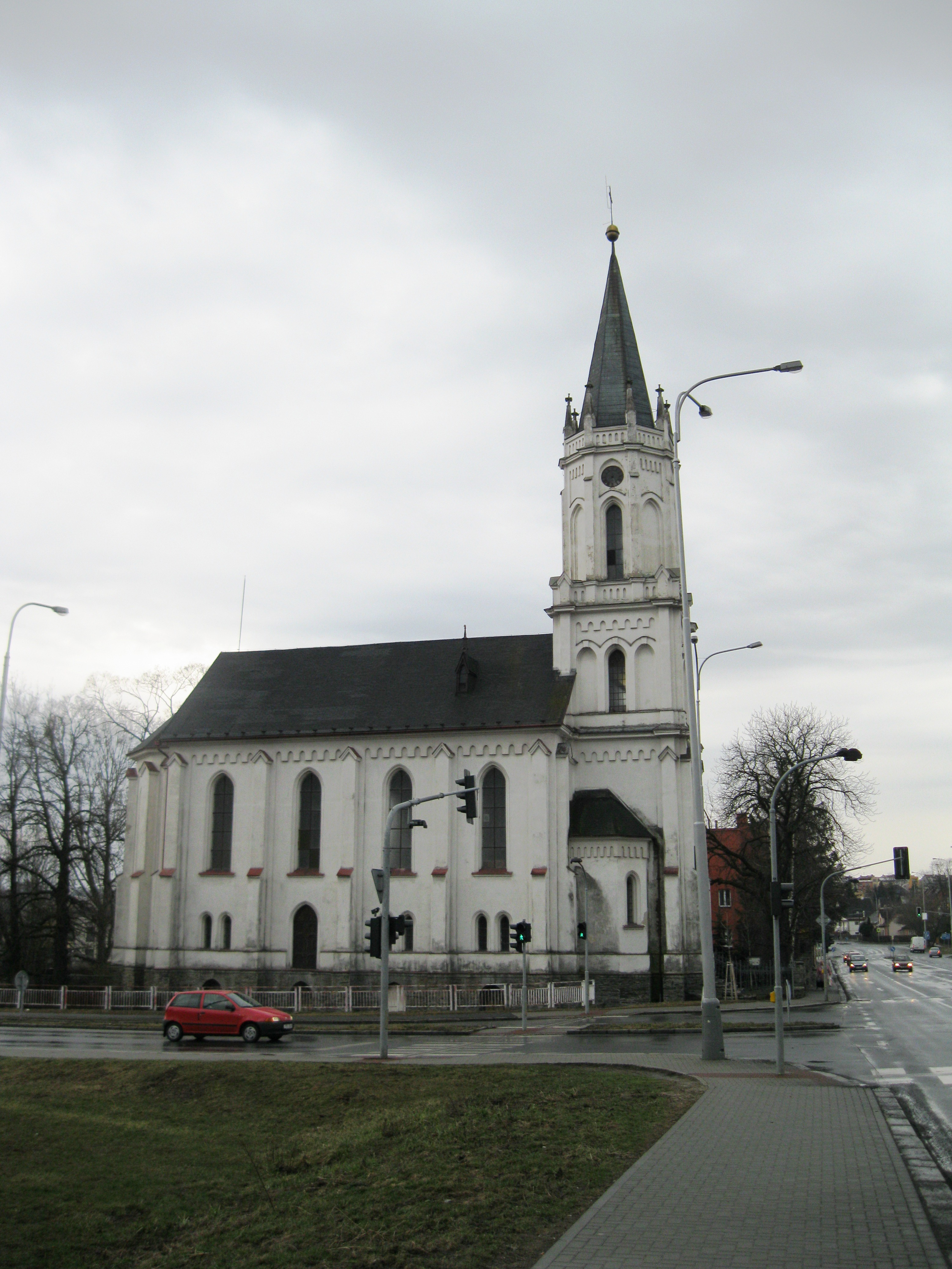 Kostel Církve československé husitské (Bruntál), Olomoucká, Bruntál